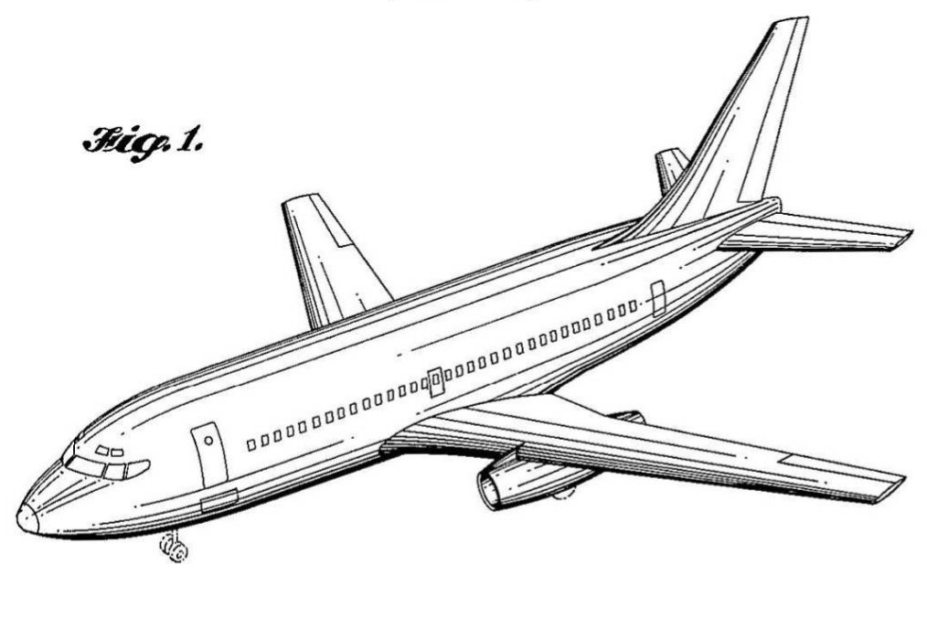 Patent sketch